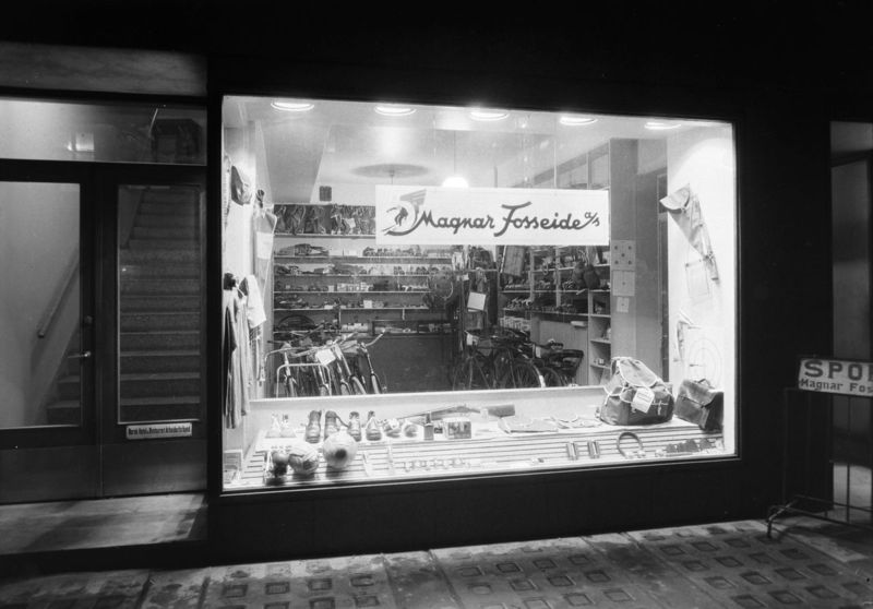 Sportsforretningen til den tidligere skiløperen Magnar Fosseide i Trondheim